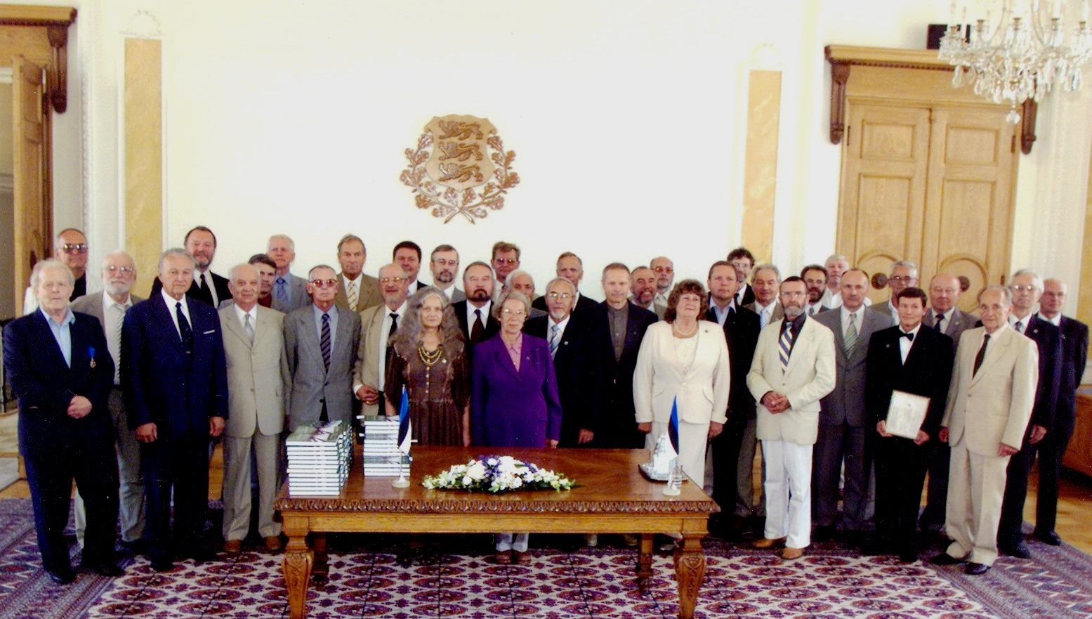 20. Augusti Klubi liikmed Toompea lossi valges saalis 20. augustil 2005.